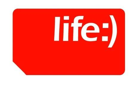 Life;) logo 2005-2015